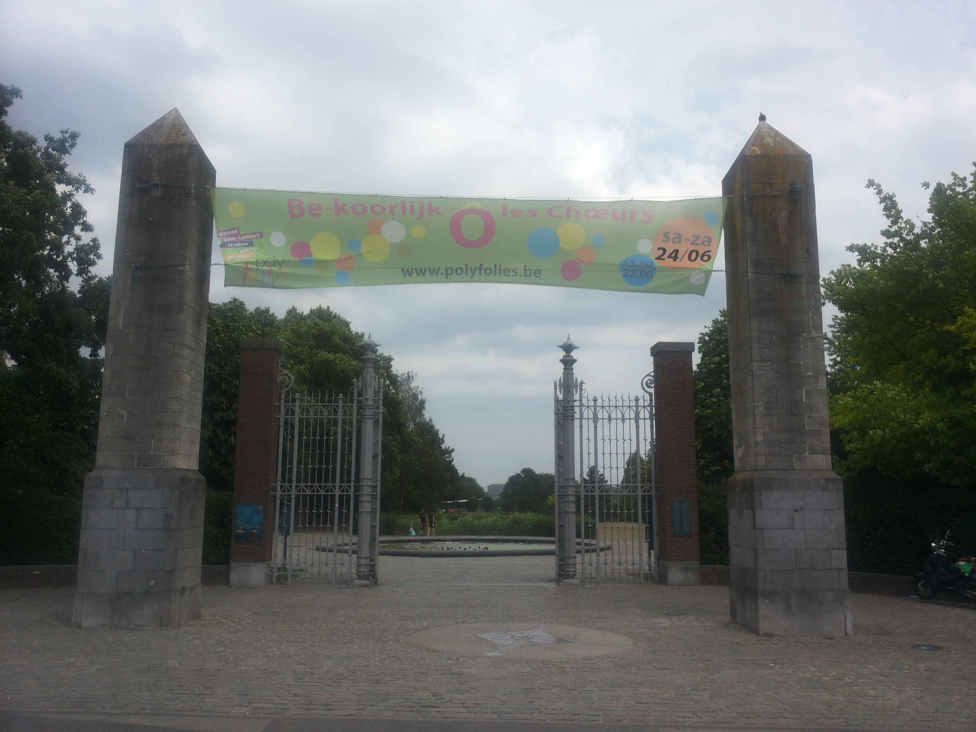 Ingang Georges Henripark